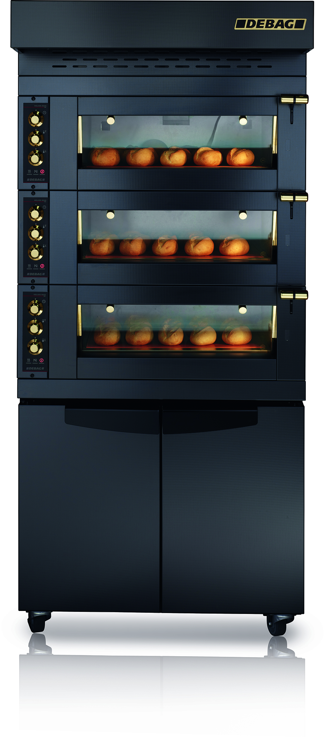 Helios Nostalgie Edition